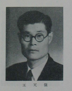 中文（台灣）: 中國人民政治協商會議第一屆全體會議代表